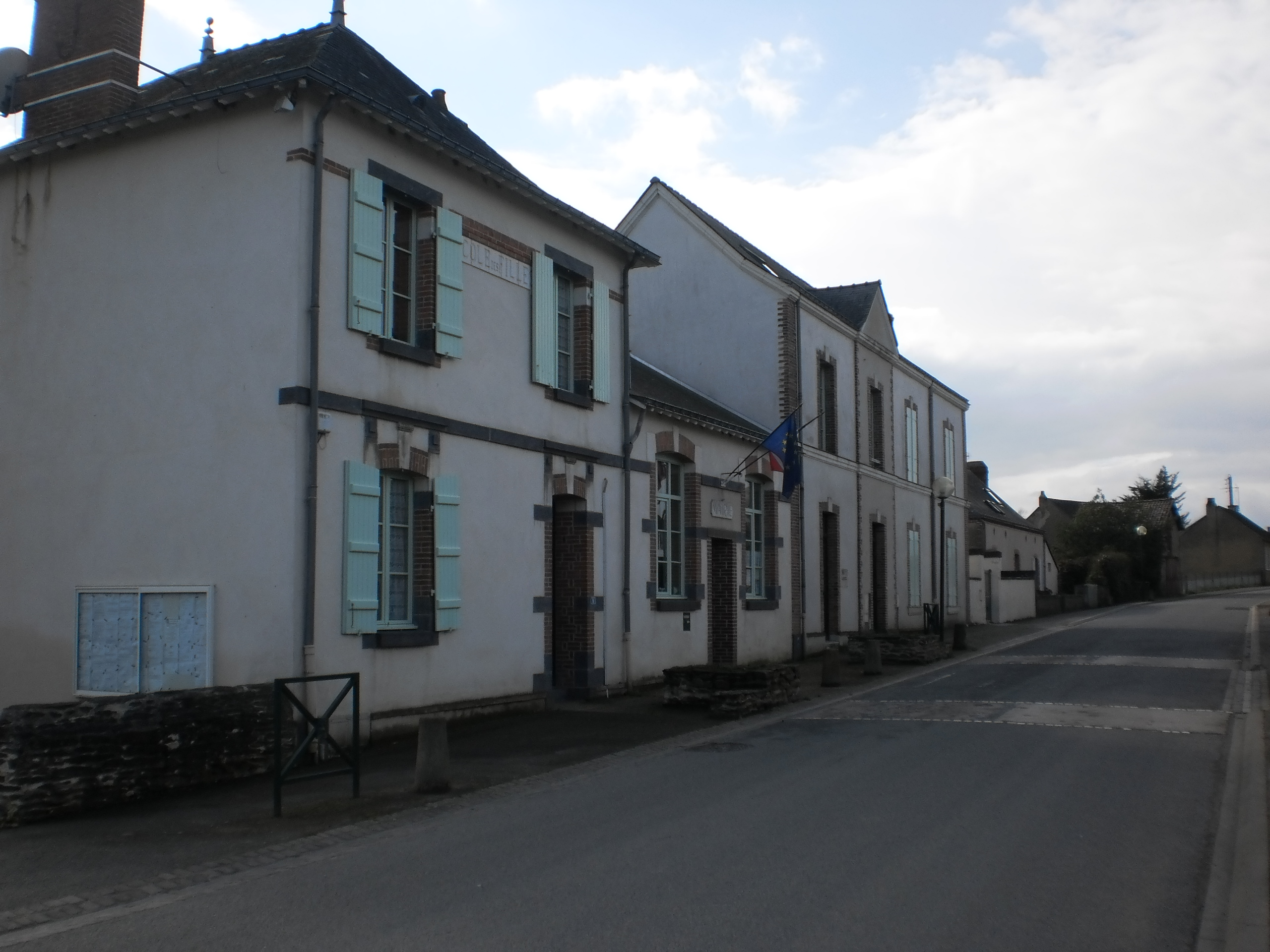 Juigné-des-Moutiers (Loire-Atlantique) - France - mairie